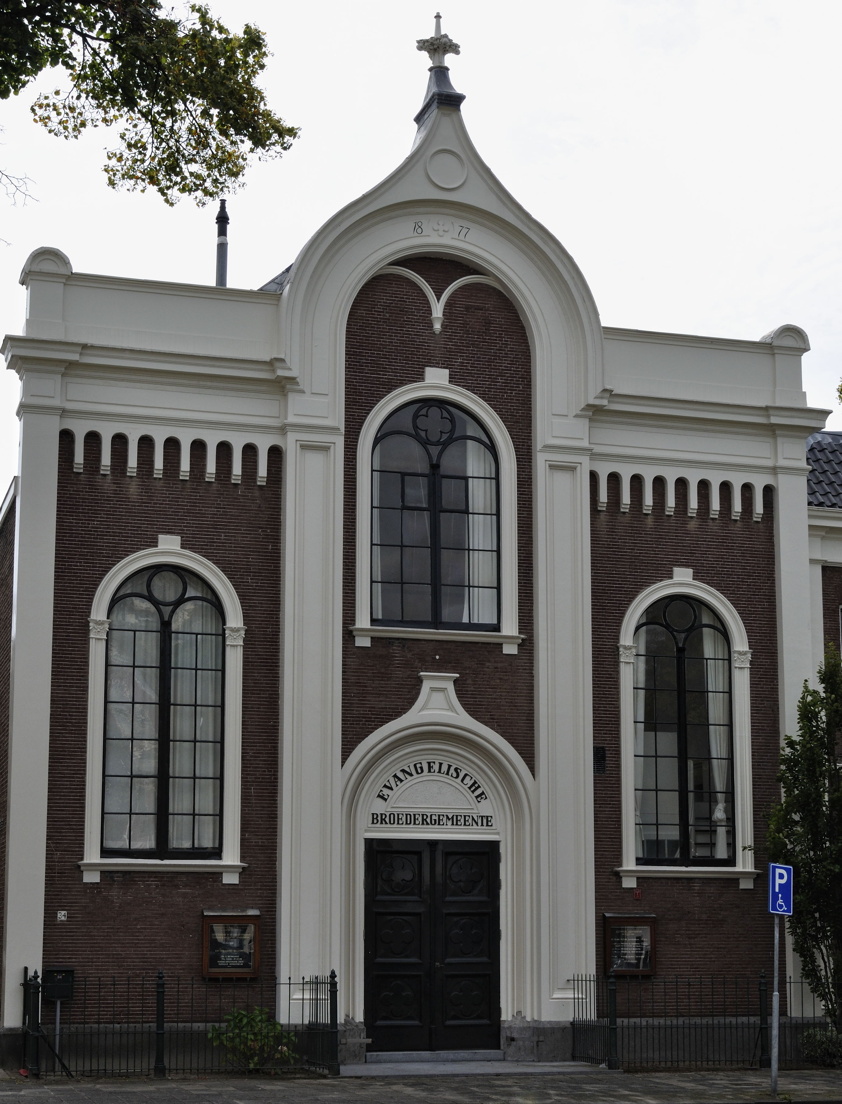 Parklaan 34, Haarlem